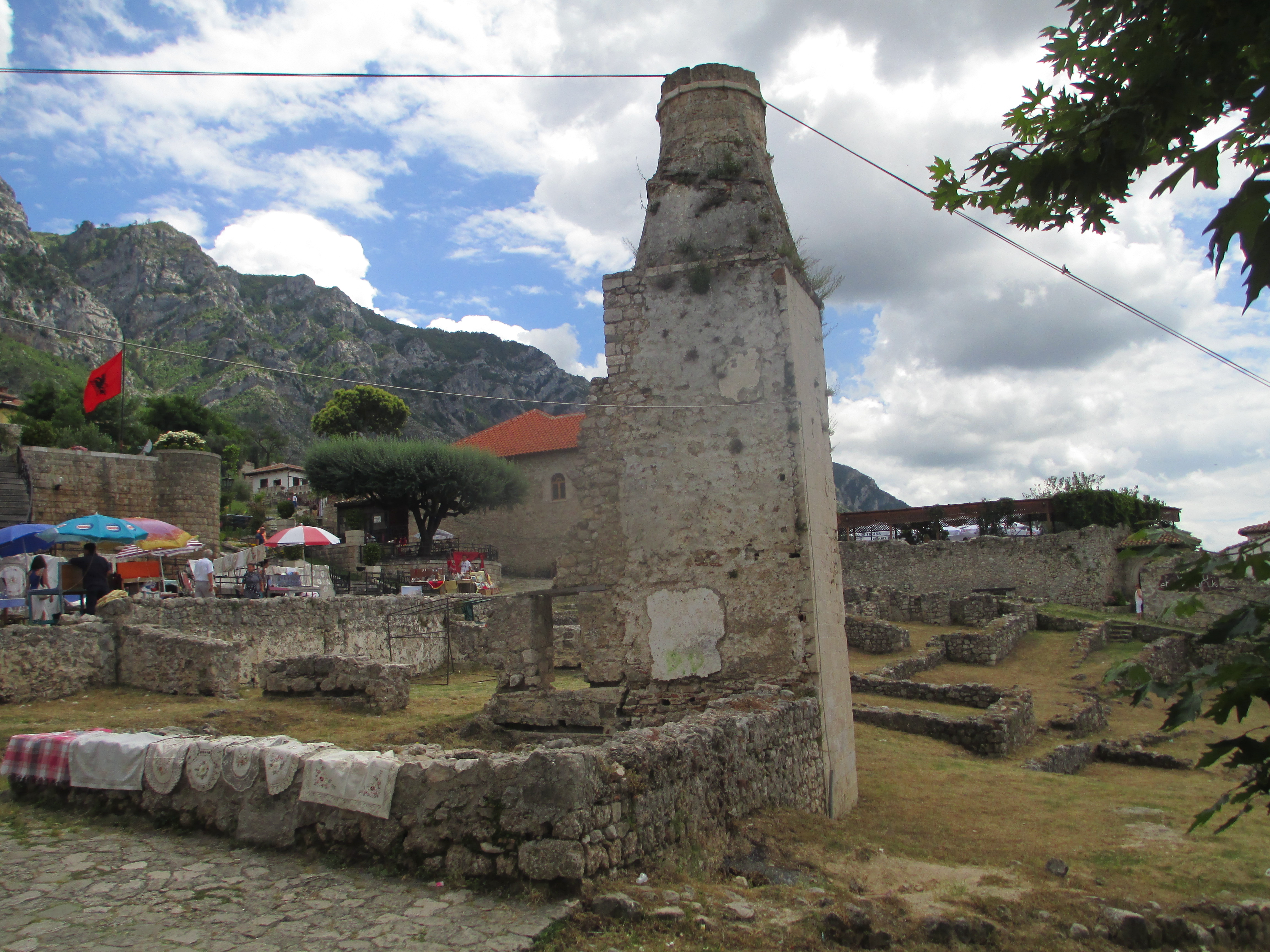 שרידי מסגד במבצר קרויה